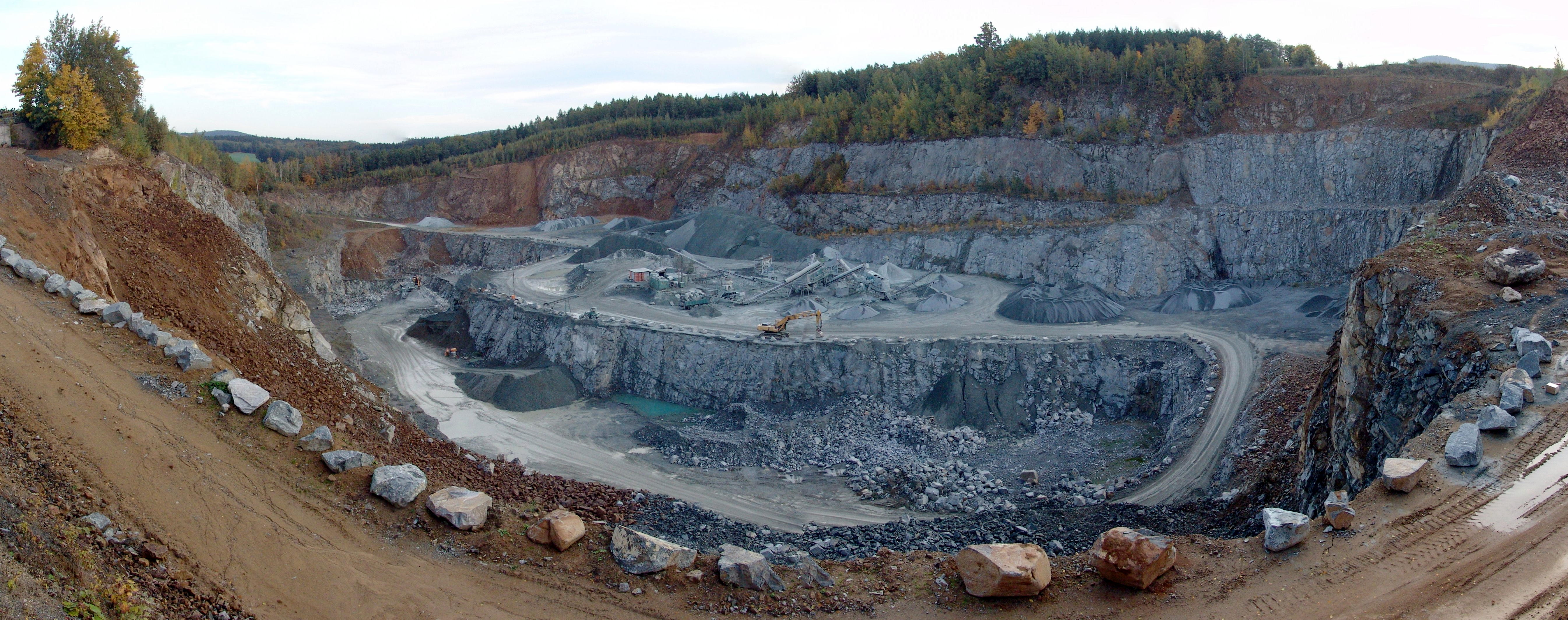 Steinbruch Klunst in Ebersbach Okt. 2008